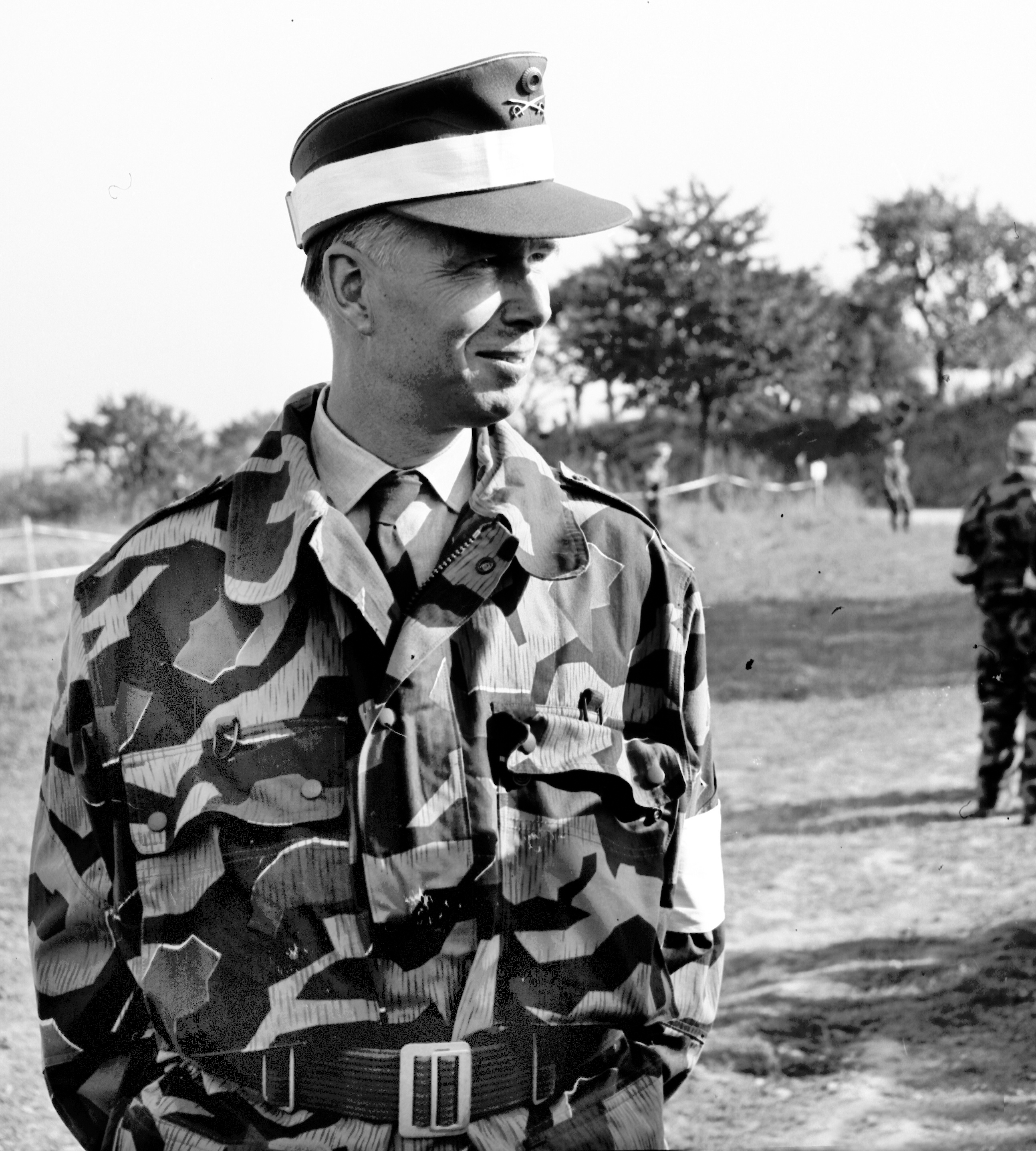 Generalmajor Wolf Stefan Traugott Graf von Baudissin (* 8. Mai 1907 in Trier; † 5. Juni 1993 in Hamburg) war ein deutscher General, Militärtheoretiker und Friedensforscher. Baudissin war maßgeblich am Aufbau der Bundeswehr und insbesondere an der Entwicklung der Inneren Führung beteiligt.